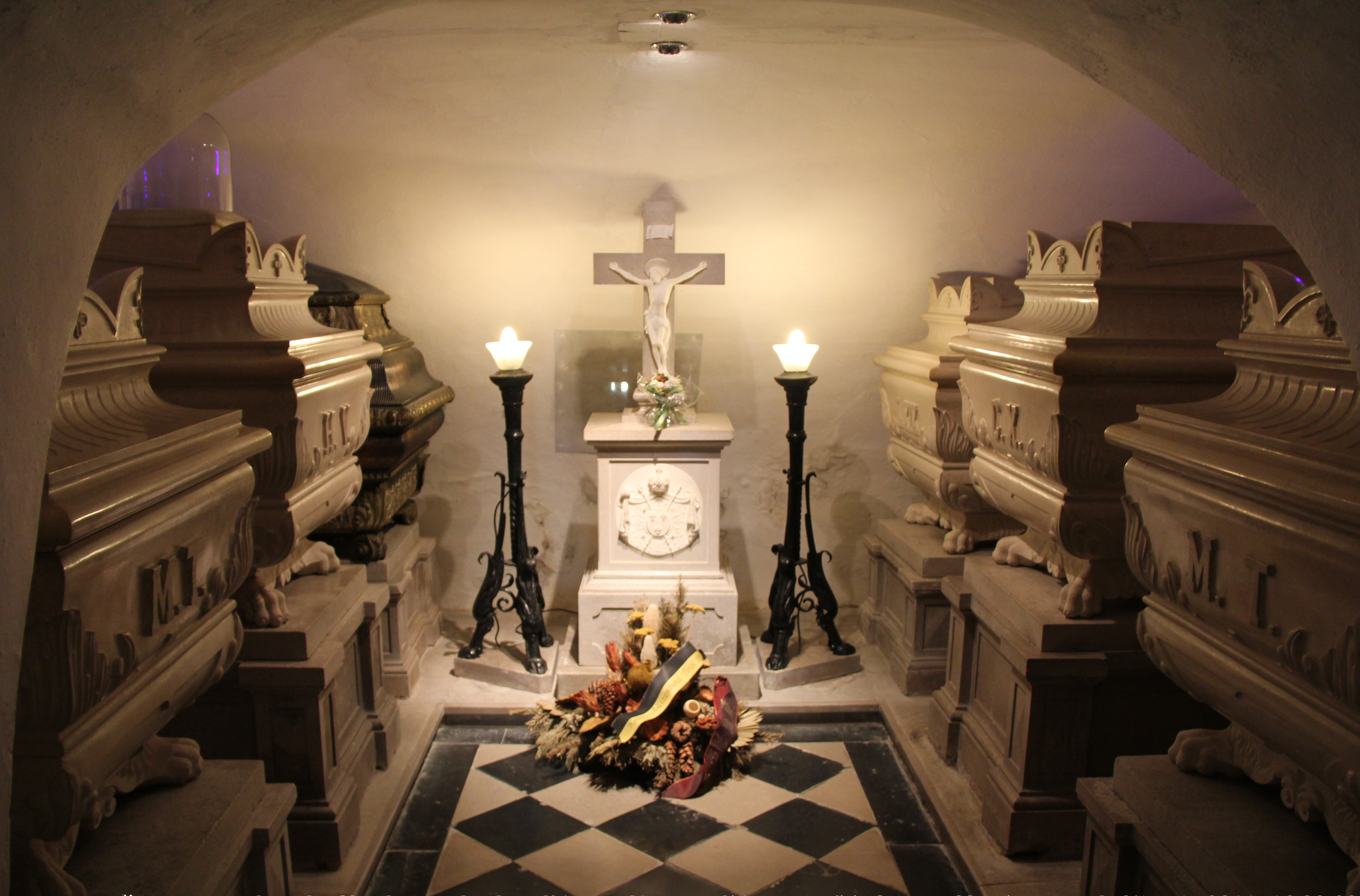 Couvent de Kostanjevica, Görz, Göritz, auj. Nova Gorica.